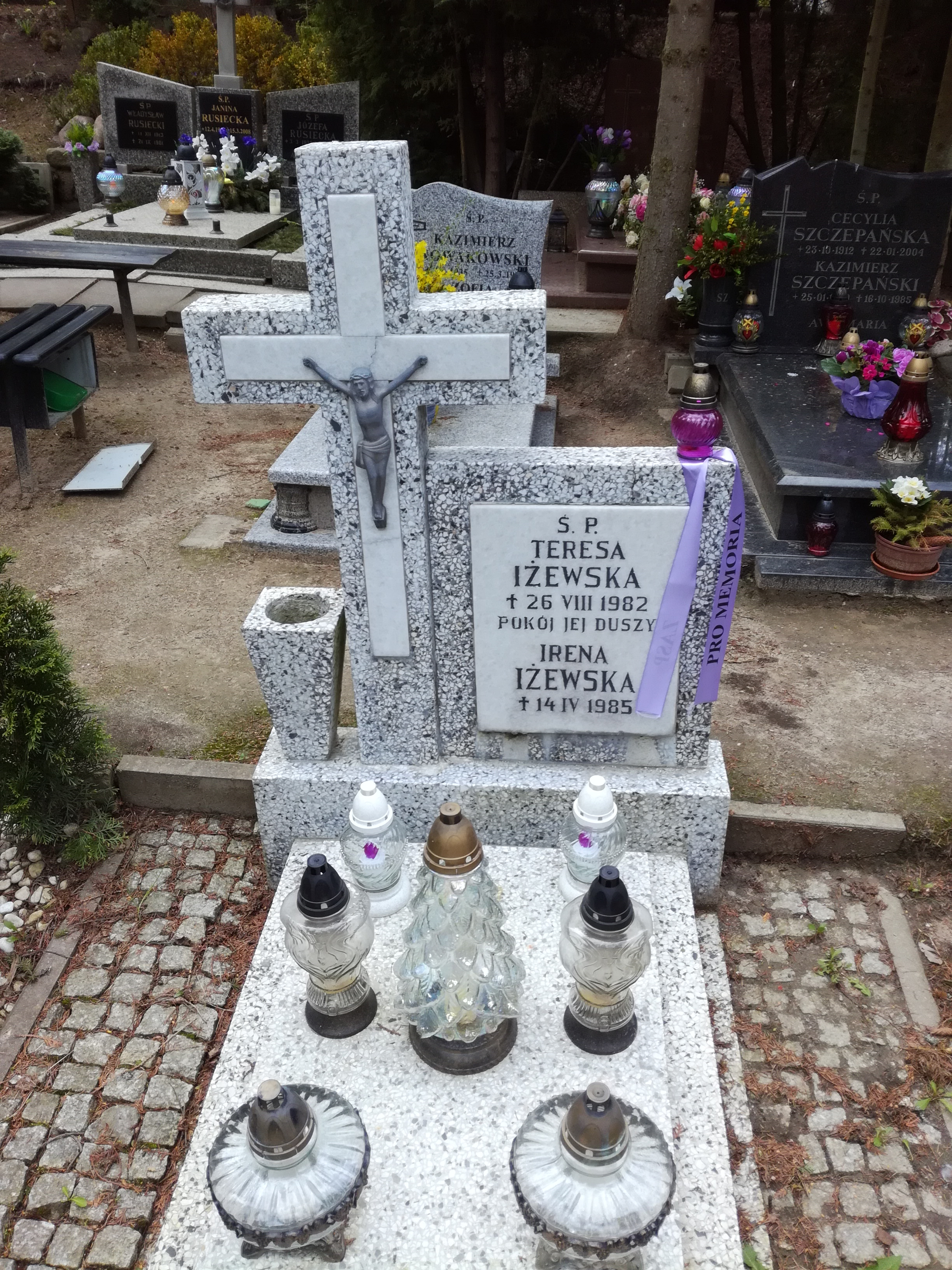 Grób aktorki Teresy Iżewskiej.